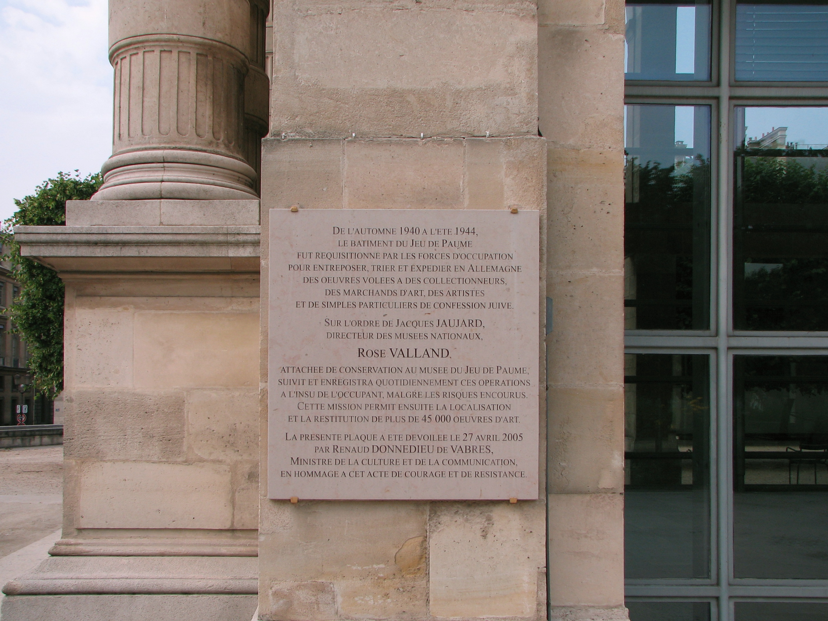 Plaque commemorative de l'action de Rose Valland sur le mur de la Galerie nationale du Jeu de Paume à Paris Commemorative tablet for Rose Valland on the wall of the Galerie nationale du Jeu de Paume in Paris.